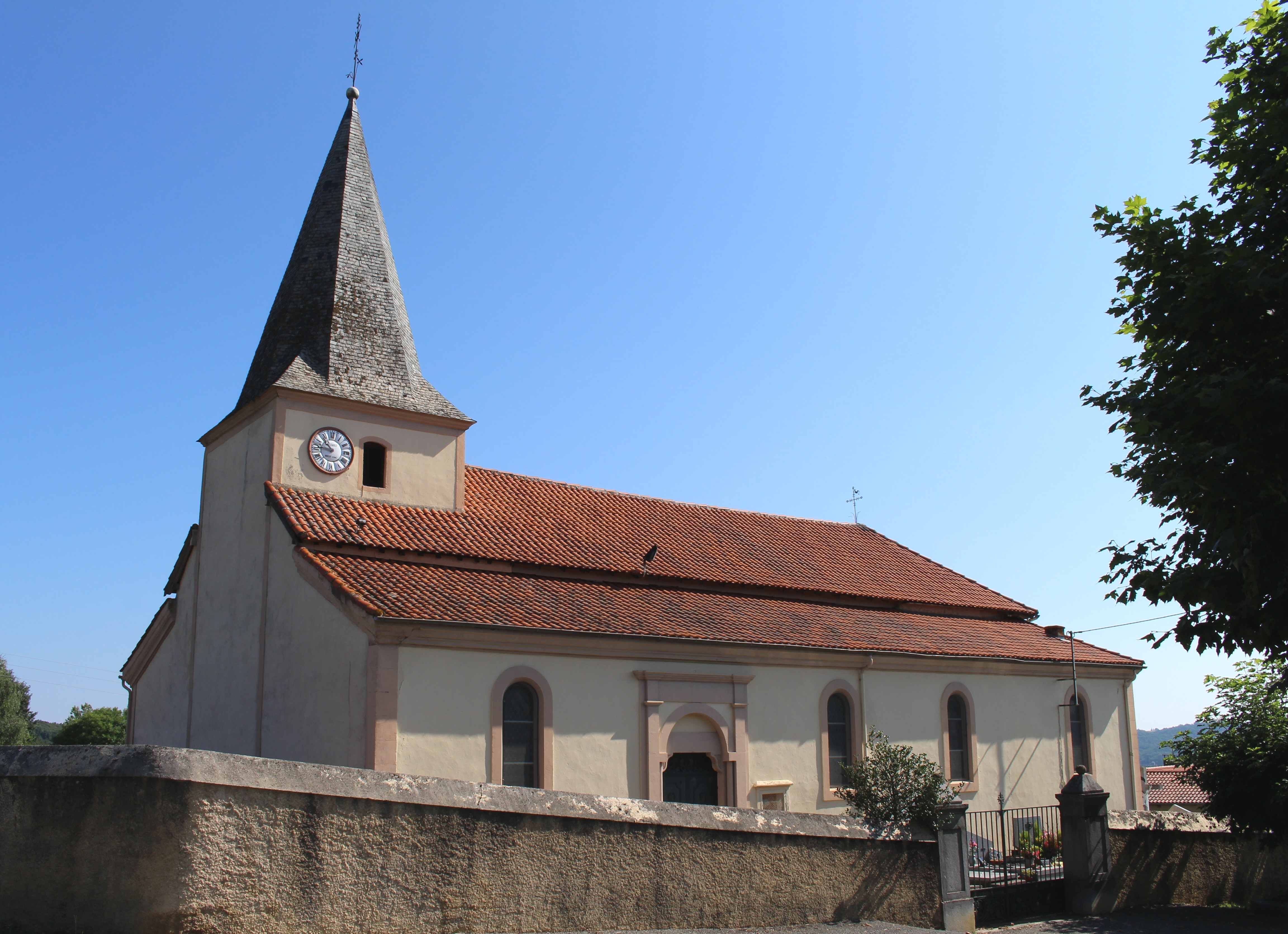 Église de l'Assomption de Bonrepos (Hautes-Pyrénées)